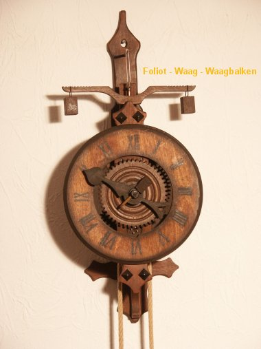 Foliot - Waag - Waagbalken. Gangregler altertümlicher Uhren